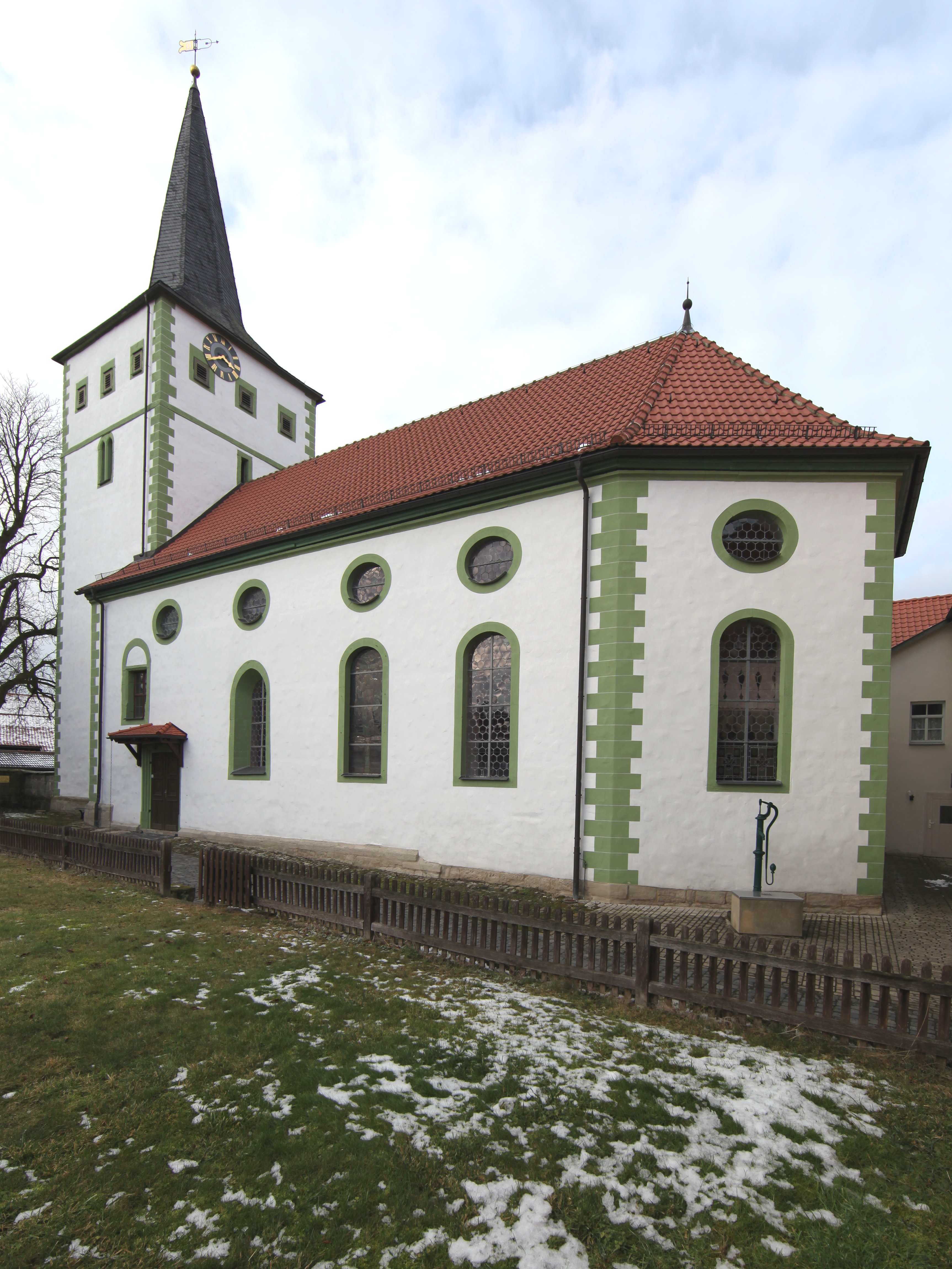 Ev. Kirche St. Cyriakus in Gellershausen, OT von Bad Colberg-Heldburg, Landkreis Hildburghausen